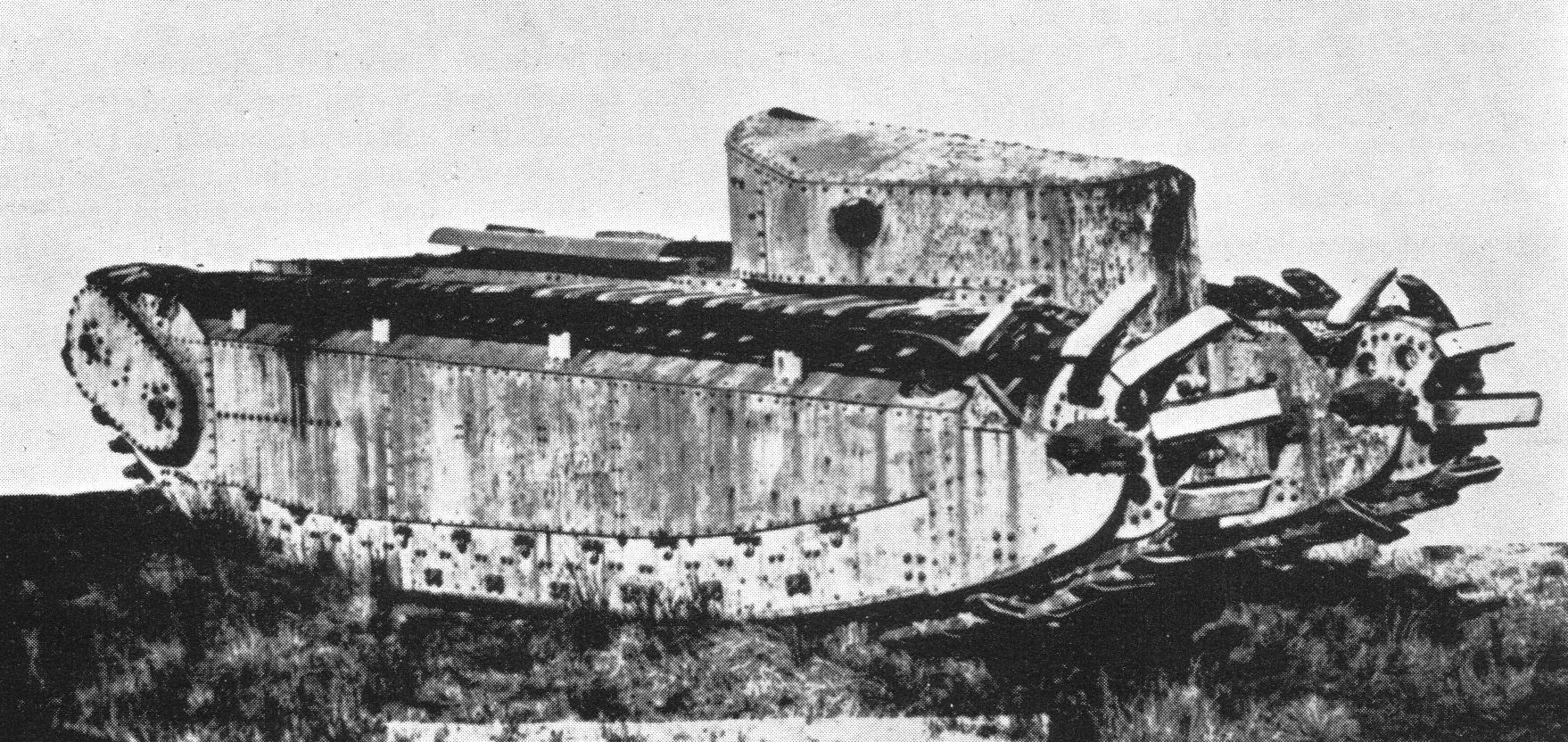 Digitale reproductie foto Medium Mark D** tank